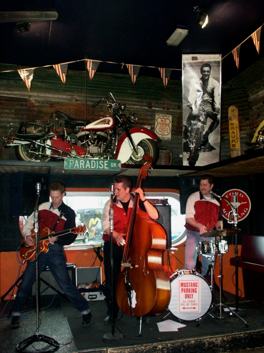 Gazz Guzzlers tijdens een optreden bij Caddy's Diner in Purmerend, Nederland